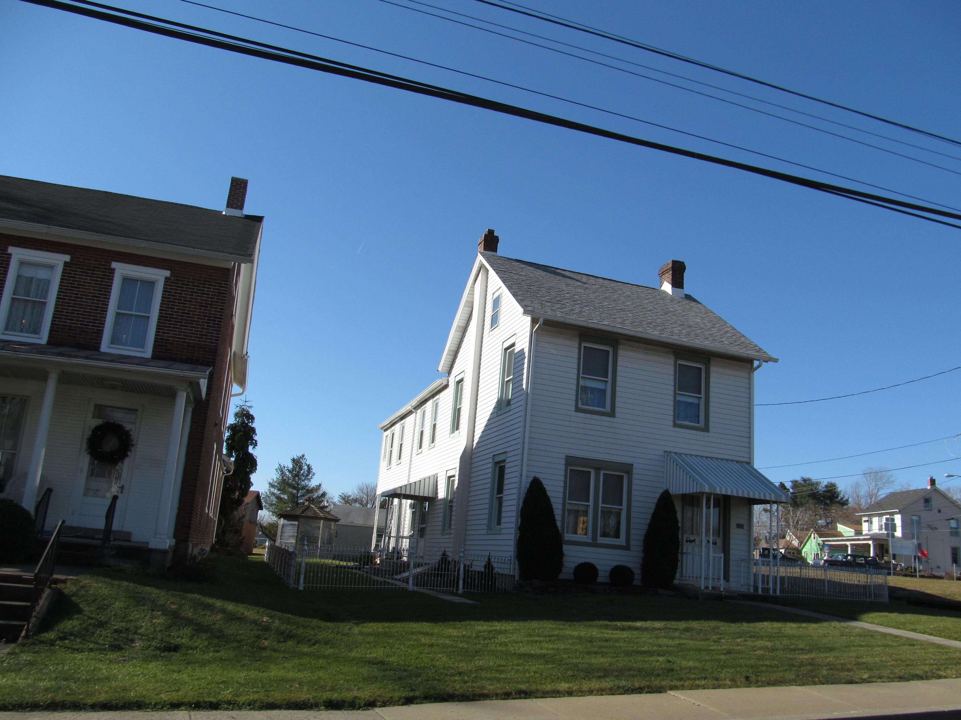 Orefield, Pennsylvania